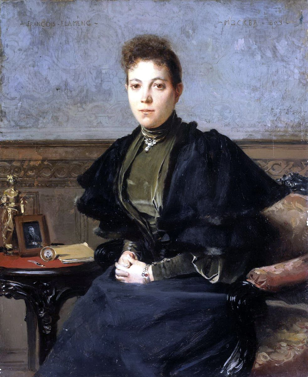 Франсуа Фламенг Портрет Веры Андреевны Харитоненко (Женский портрет) 1893 Дерево, масло. 45 х 36 см Государственный Эрмитаж Происхождение 1930, из ГМИИ, до 1924 в ГМФ, до 1918 в собрании П.И. и В.А. Харитоненко, 1948, ГЭ Инв.: 8916